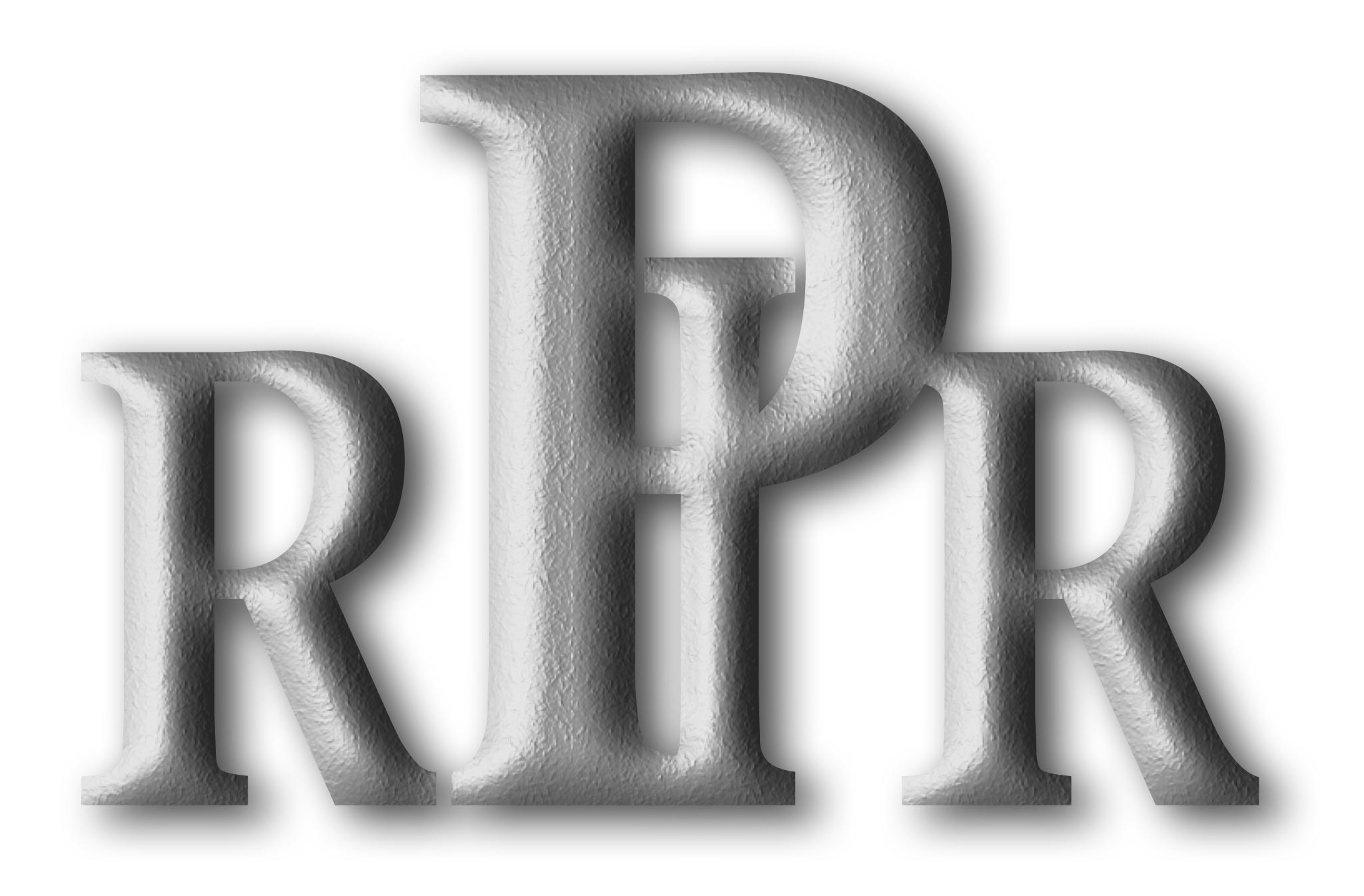 Odtworzony z archiwalnych materiałów znak graficzny (logo) bielskiego PIRR-u.